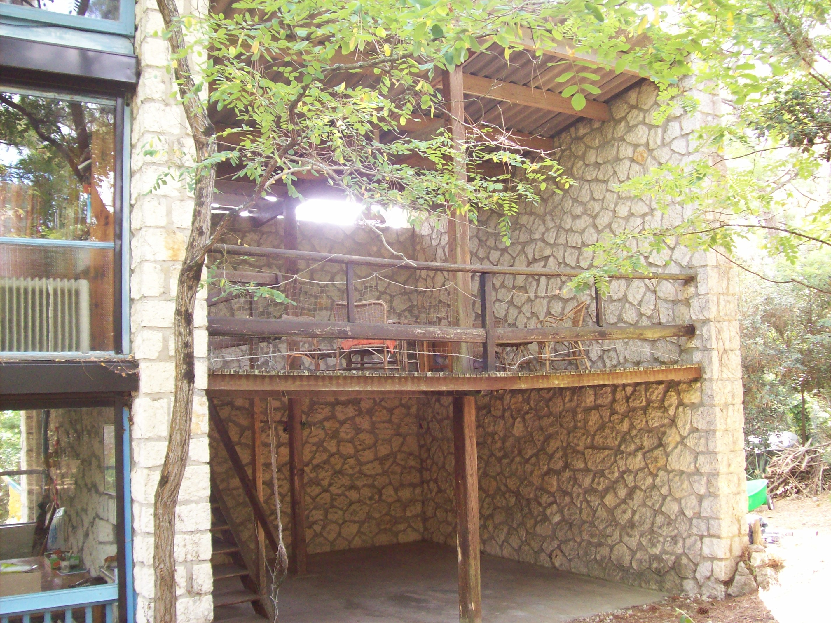 Maison de vacances dessinée par Le Corbusier pour la famille Peyron. Propriétaires actuels : Mme Ariane Peyron et Héritiers de Anne Peyron-Ginger.